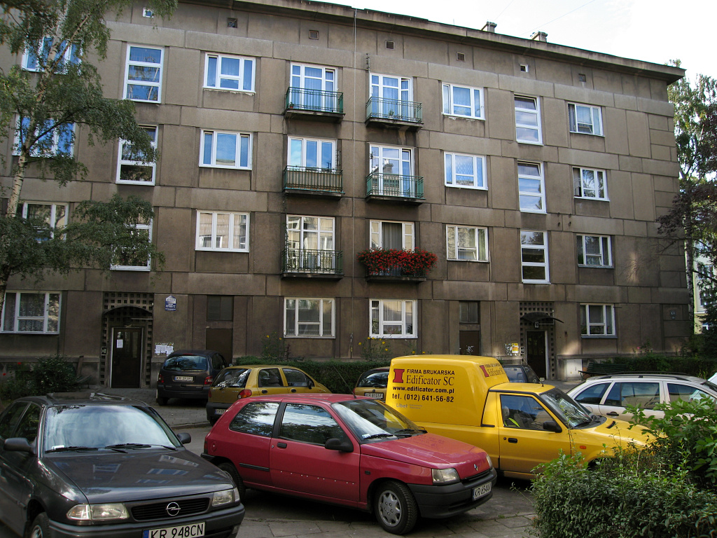 Pierwsze bloki z Wielkiej Płyty w Polsce. Kraków - Nowa Huta os. Hutnicze ul. Mierzwy